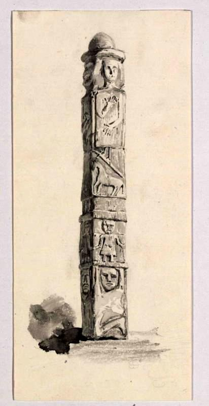 Steinsäule aus dem Fluss Zbrucz in Ostgalizien. Pinselzeichnung in Schwarz, laviert, von Hugo Charlemont. Vorzeichnung zum "Kronprinzenwerk" (Die österreichisch-ungarische Monarchie in Wort und Bild, Wien 1886-1902), Bd. Galizien, 1898, S. 135